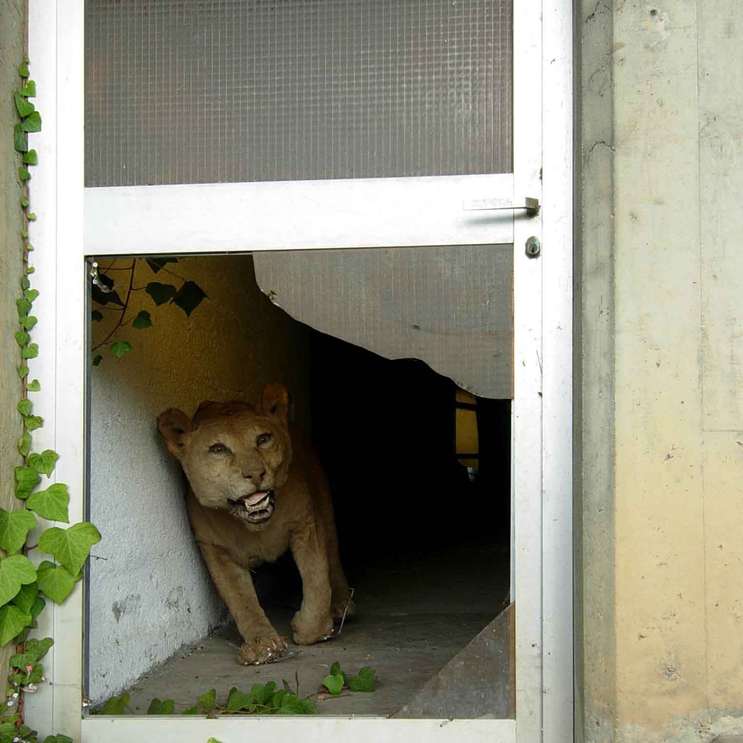 Leona disecada Mini-Zoo Parque de Atracciones de Vizcaya